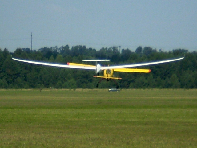 Keliamas sklandytuvas